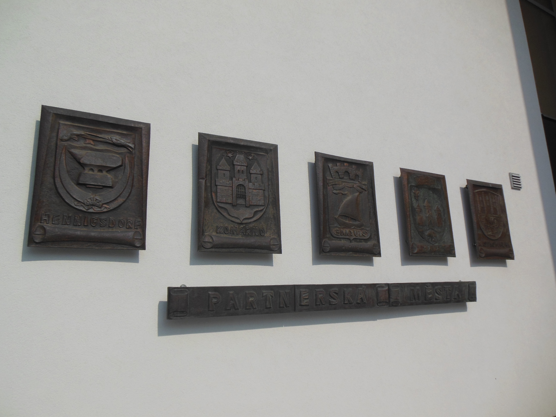 Kralupy nad Vltavou (okres Mělník). Znaky partnerských měst na radnici č. p. 1 na Palackého náměstí.